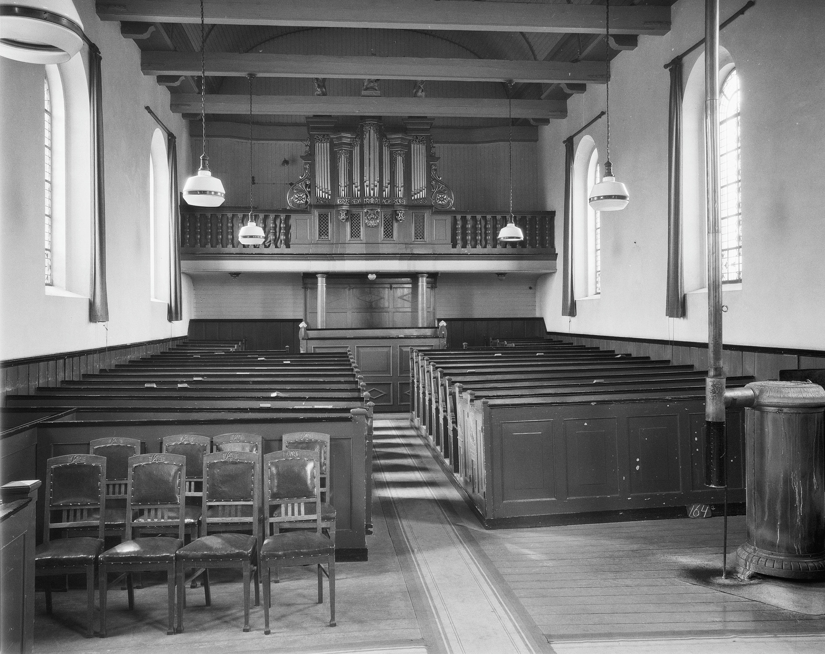 Nederlands Hervormde Kerk: interieur